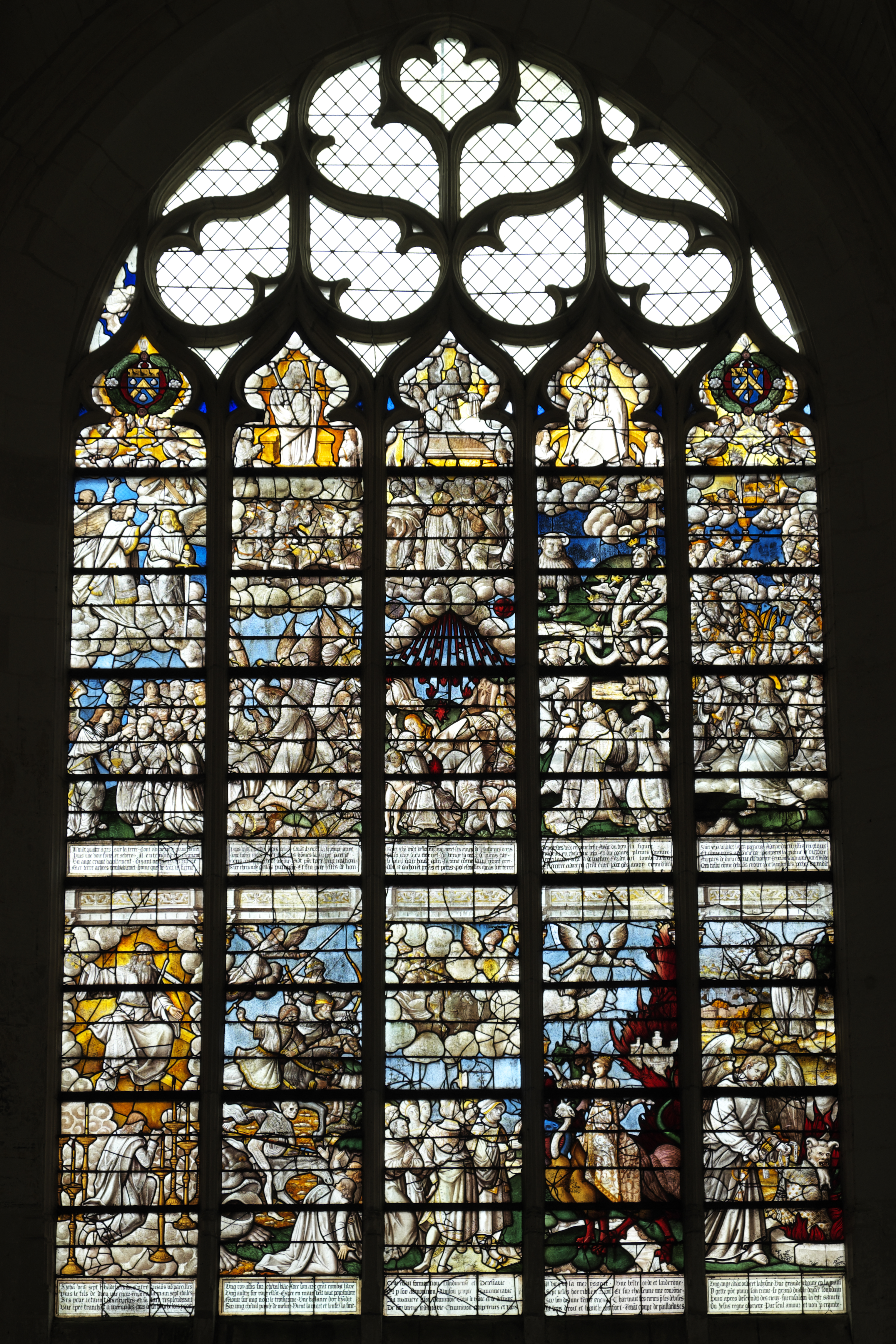 Katholische Kirche Saint-Georges in Chavanges im Département Aube (Champagne-Ardenne/Frankreich), Bleiglasfenster aus dem 16. Jahrhundert, Darstellung: Apokalypse.